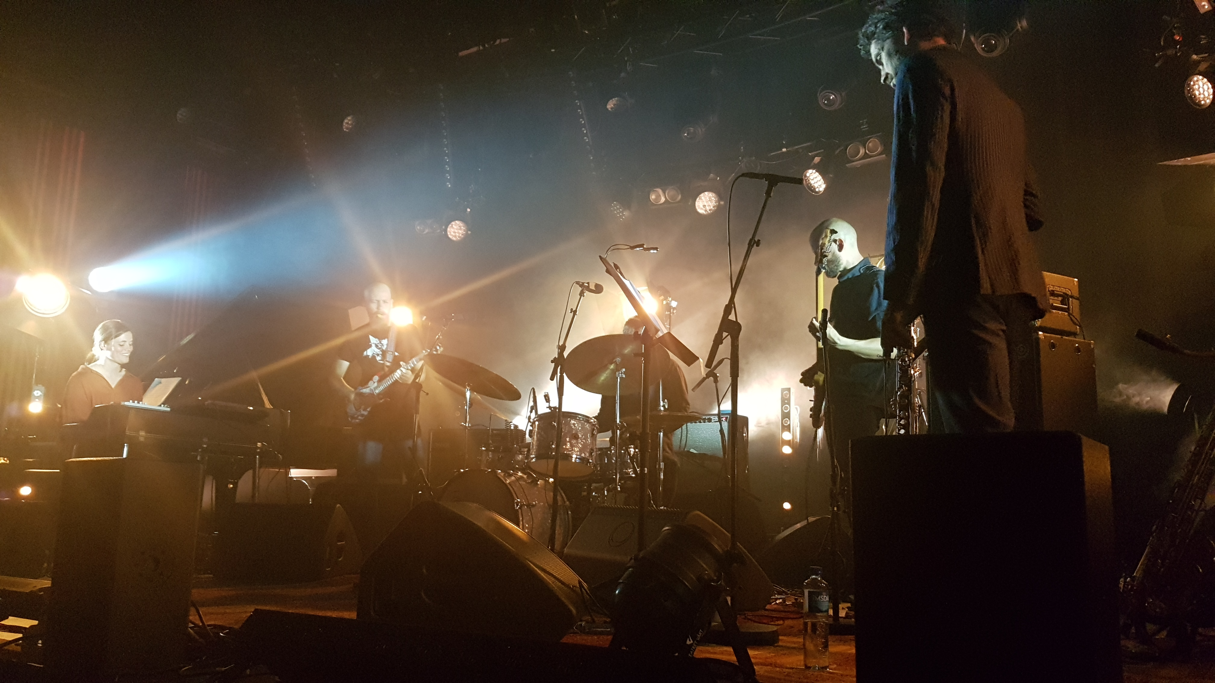 Bushman's Revenge at Moldejazz 2019